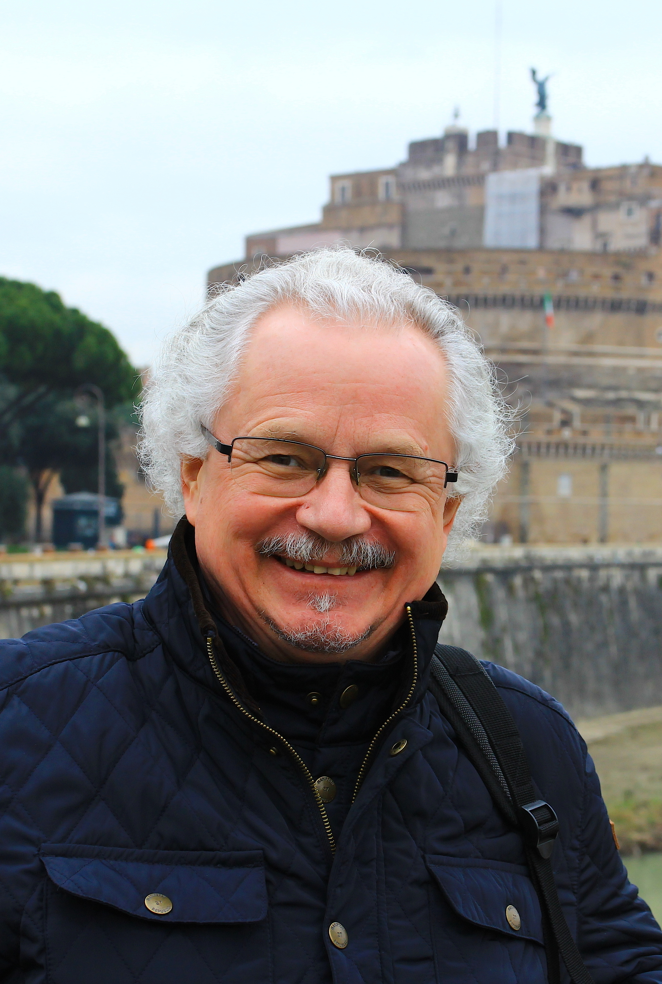 Wacław Oszajca (2014)